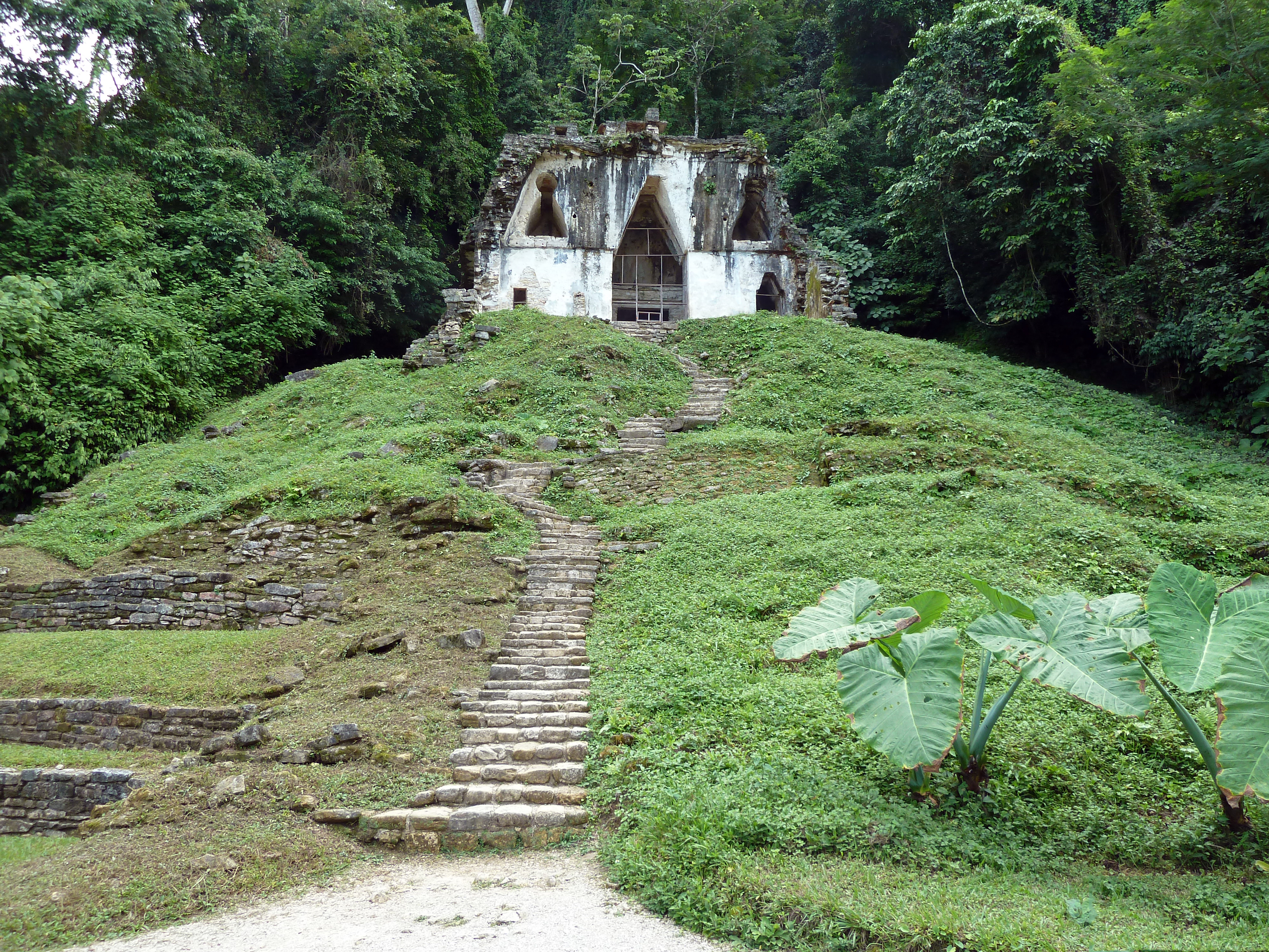 Day 9: Palenque